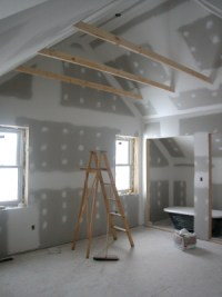 sádrokarton